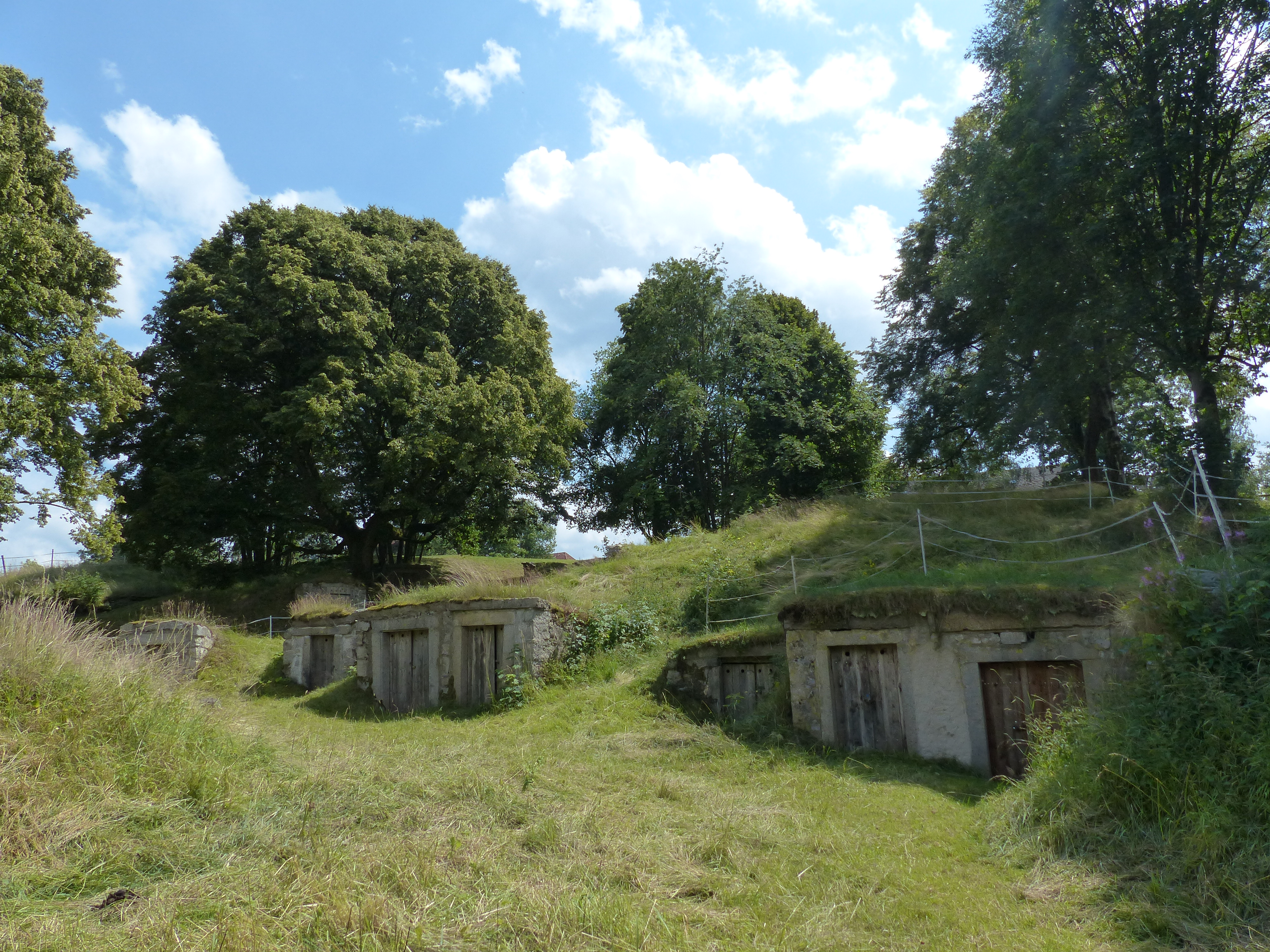 Bauwerke der Stadt Weißenstadt